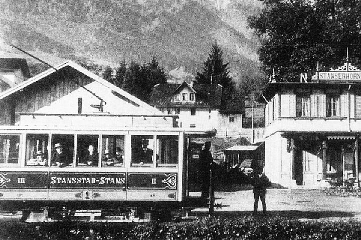 Ausschnitt aus einer zeitgenössischen Postkarte. Links einer der beiden Motorwagen Serie StSt BCe 1/2 der Strassenbahn Stansstad–Stans (StSt) im Zeitraum 1893 bis 1903 in Stans. Im Hintergrund rechts die Talstation der Stanserhorn-Bahn SthB.